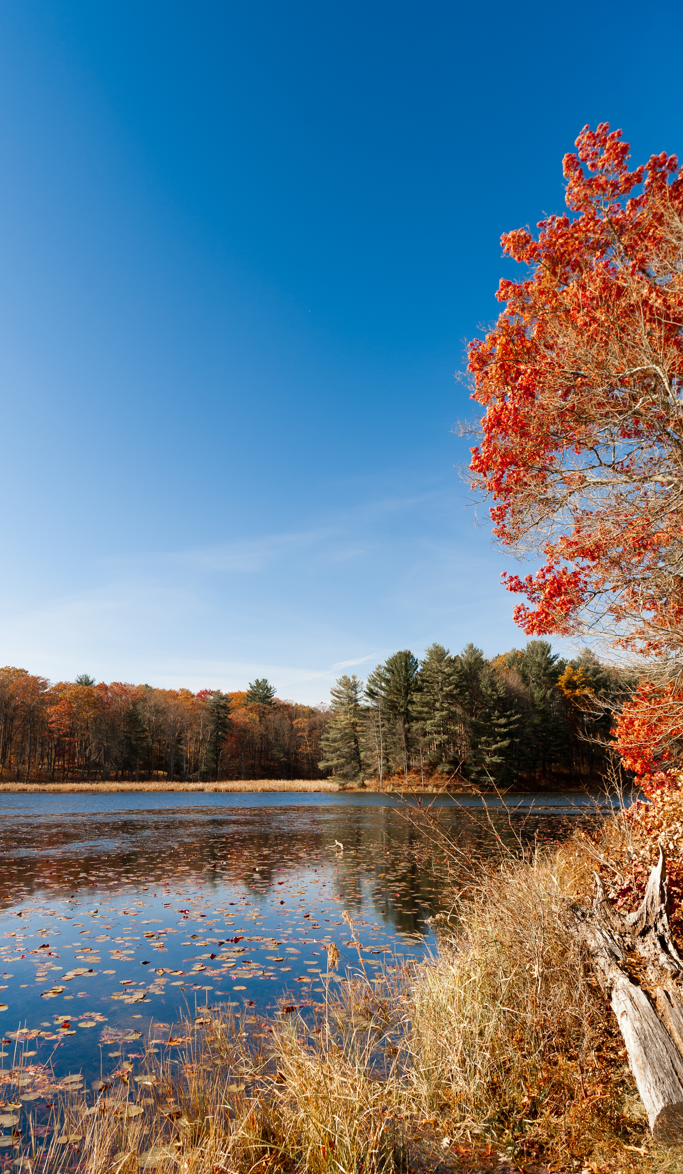 Autumn foliage :D